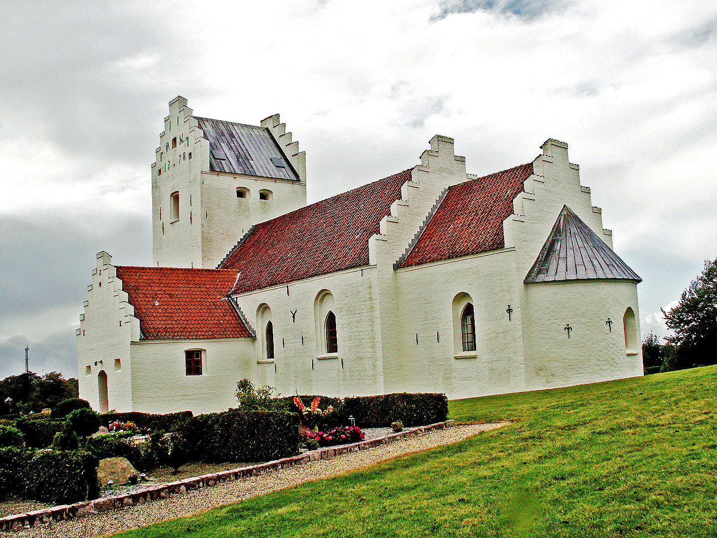 set fra sydøst